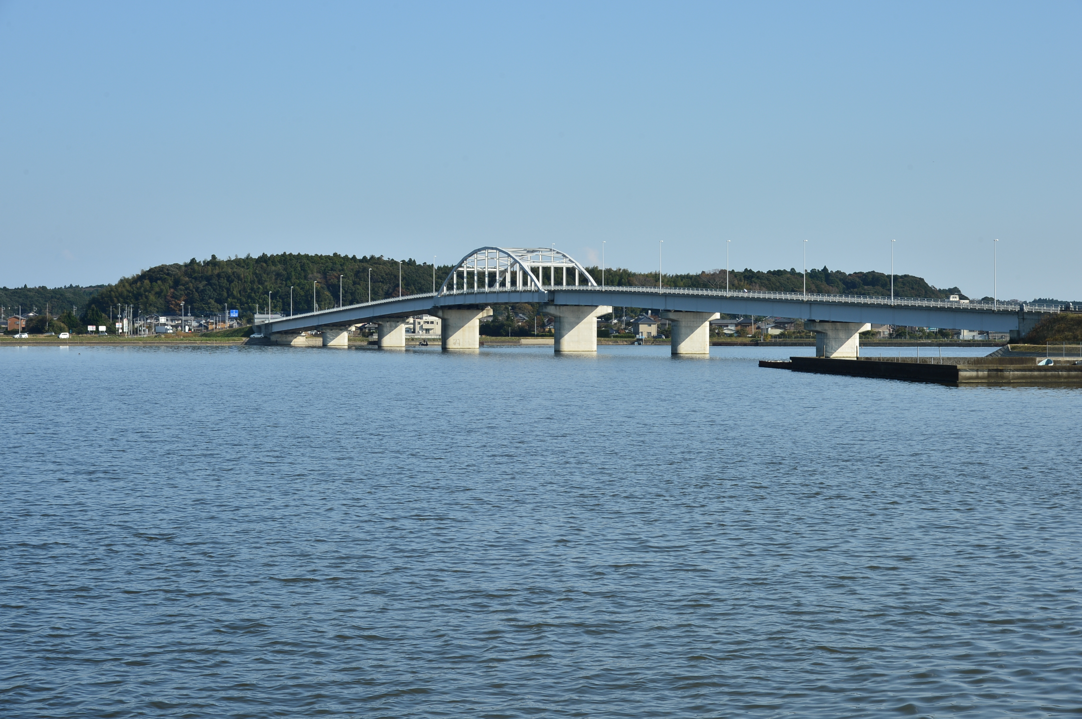 鹿行大橋の全景（2代目）